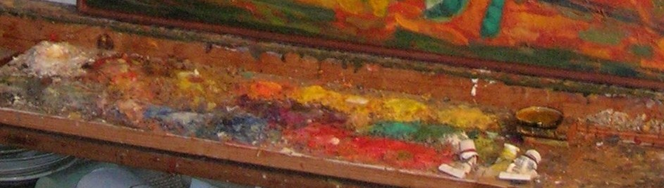 Atelier du peintre français Marcel Bouqueton (1921-2006)